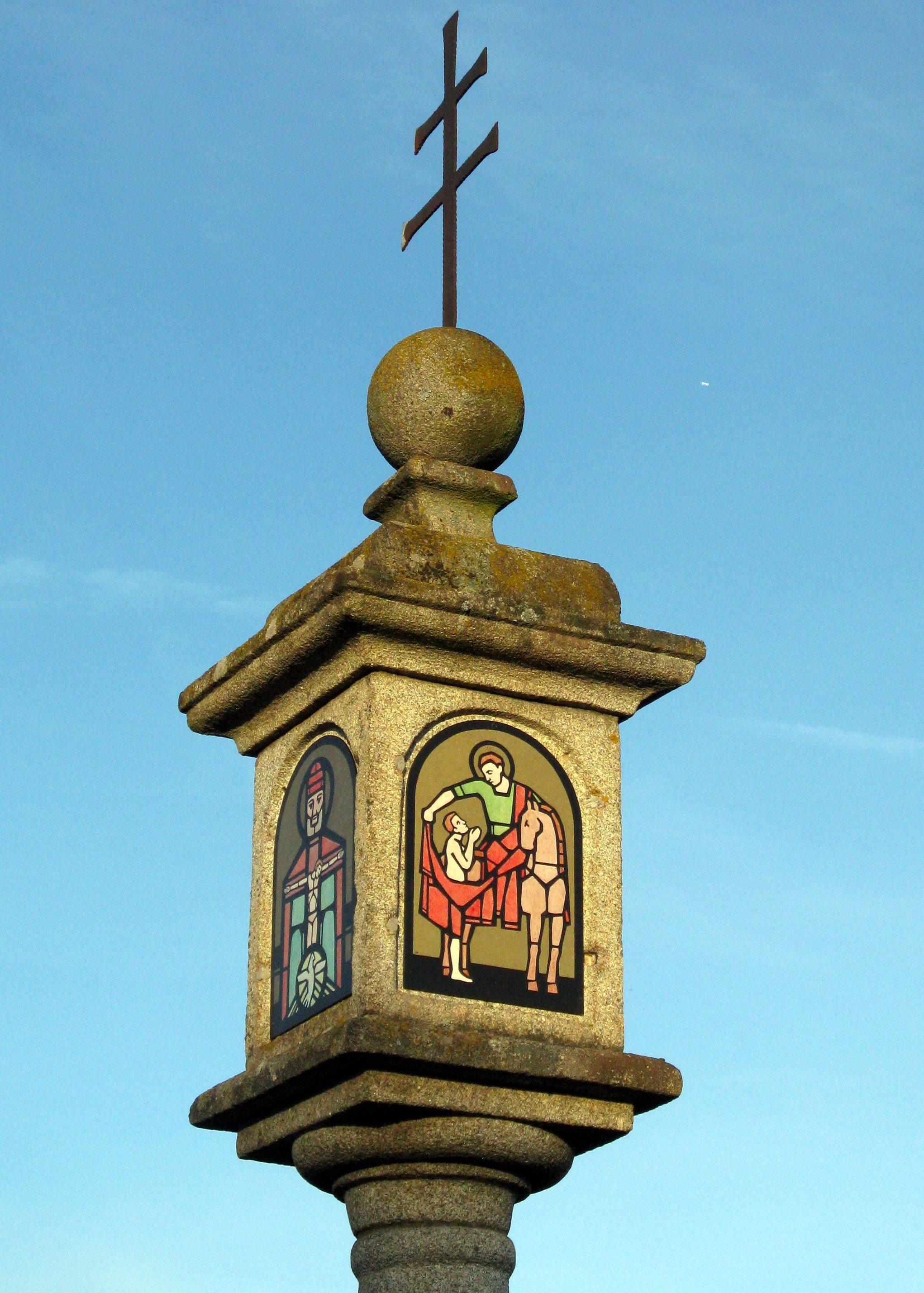 Pestsäule in Perg, Ortschaft Dörfl